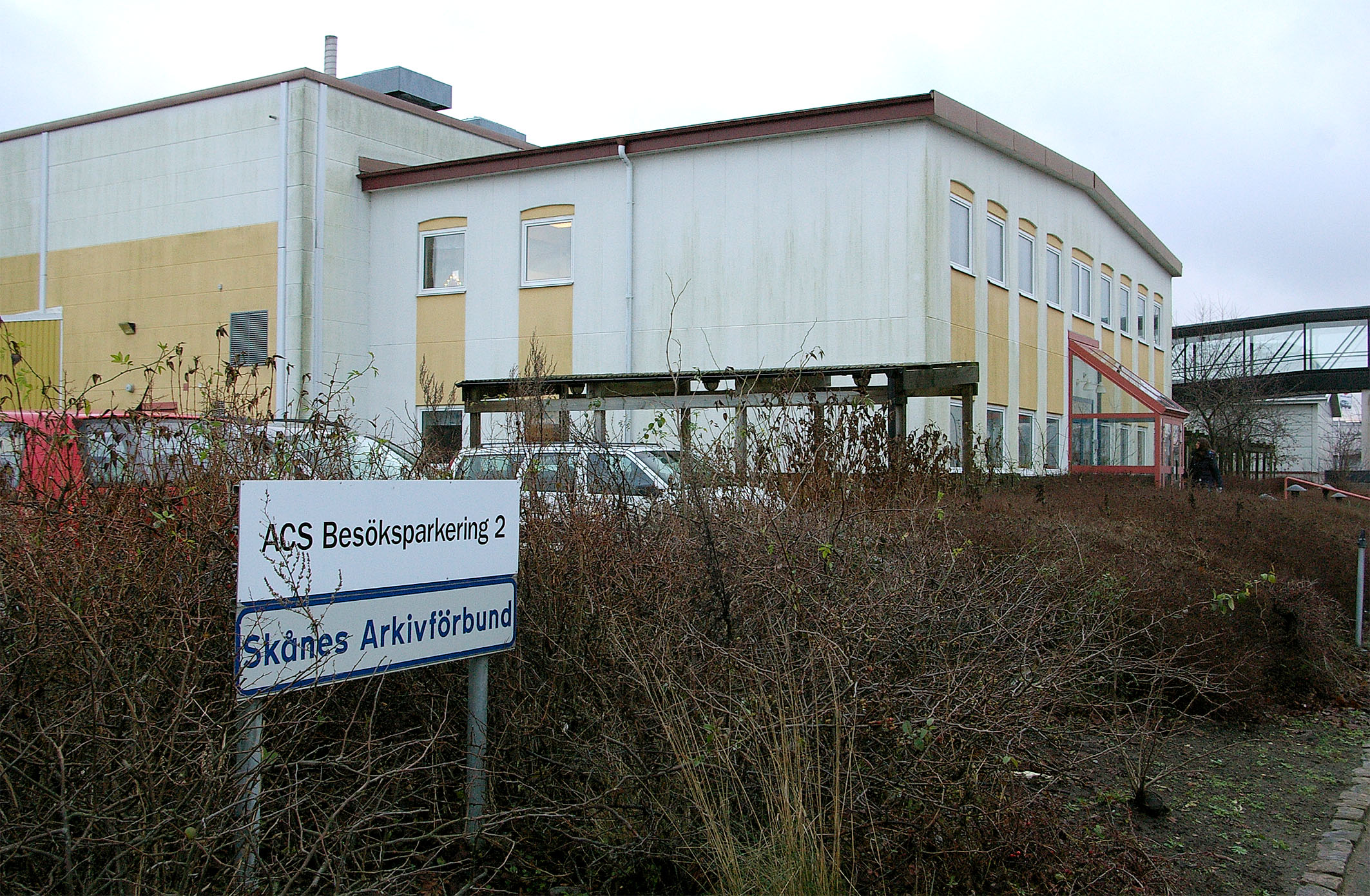 Skånes arkivförbunds lokaler i Lund, Sverige.